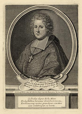 François-Louis de Clermont-Tonnerre (* um 1660; † 12. März 1724 in Langres), Bischof und Herzog von Langres (1696–1724)